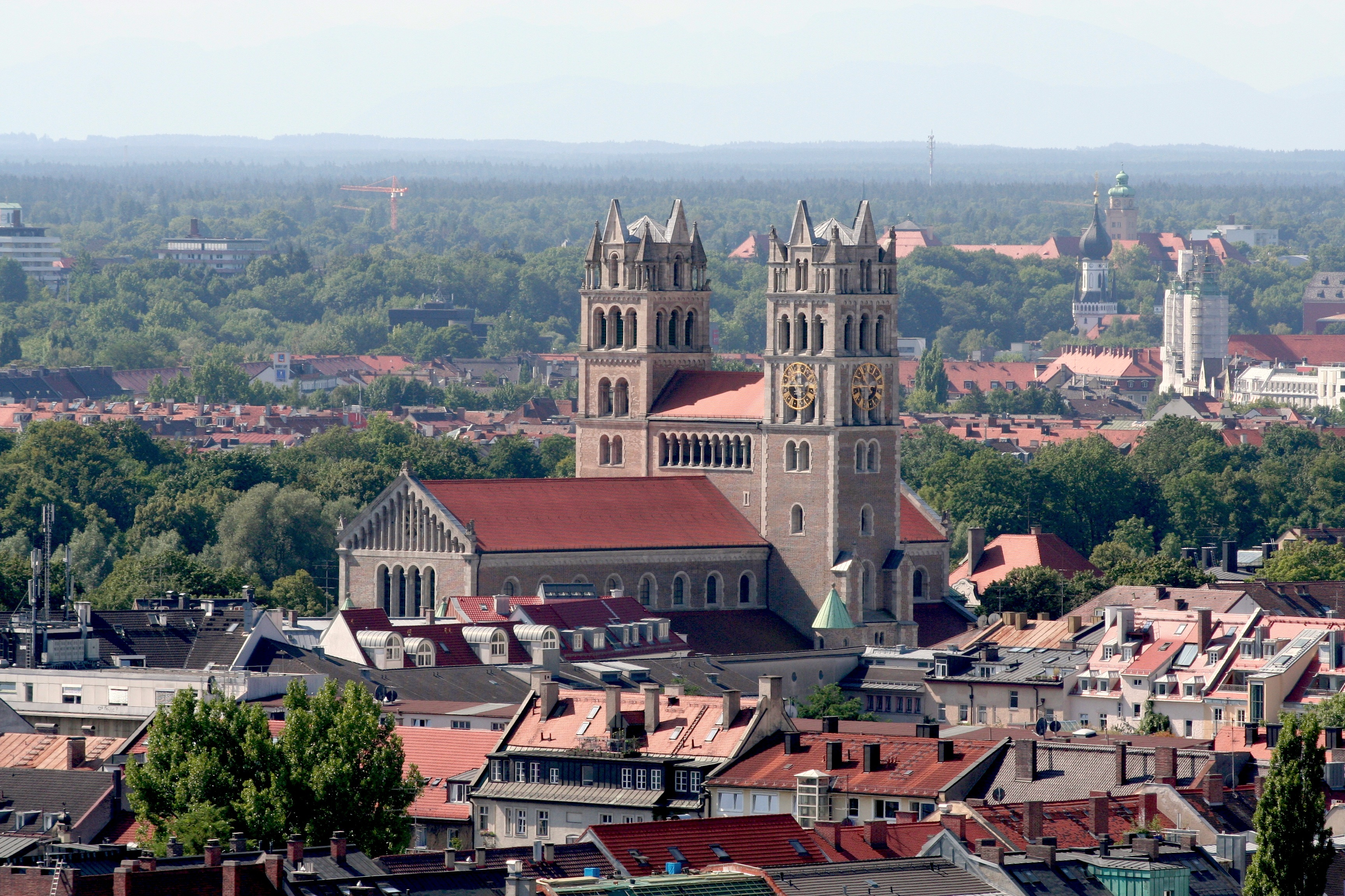 St. Maximilianskirche in der Isarvostadt